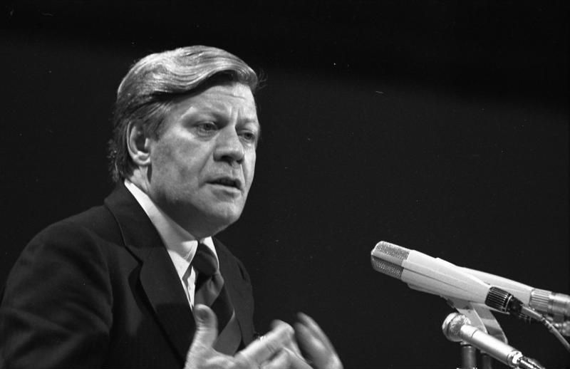 Außerordentlicher Parteitag der SPD in der Westfalenhalle Dortmund